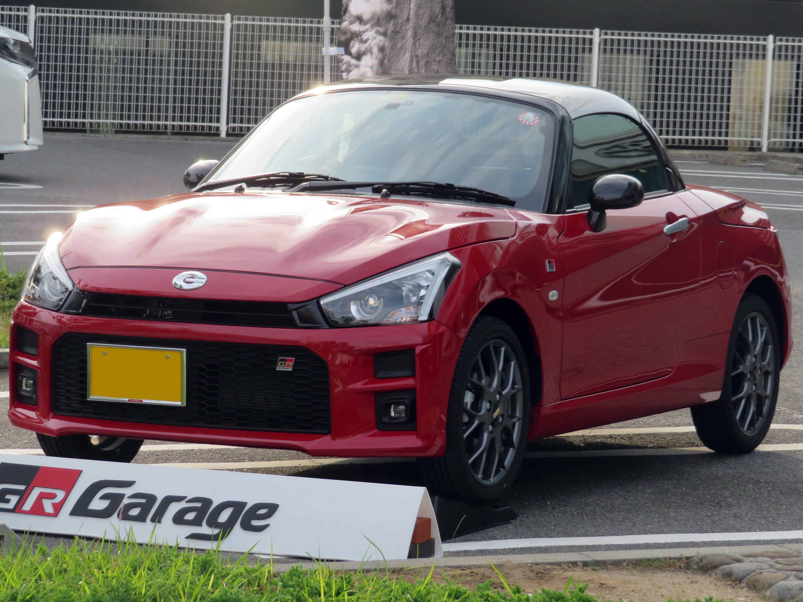 ３BA-LA400A型トヨタ・コペンGR SPORTをフロントから撮影。